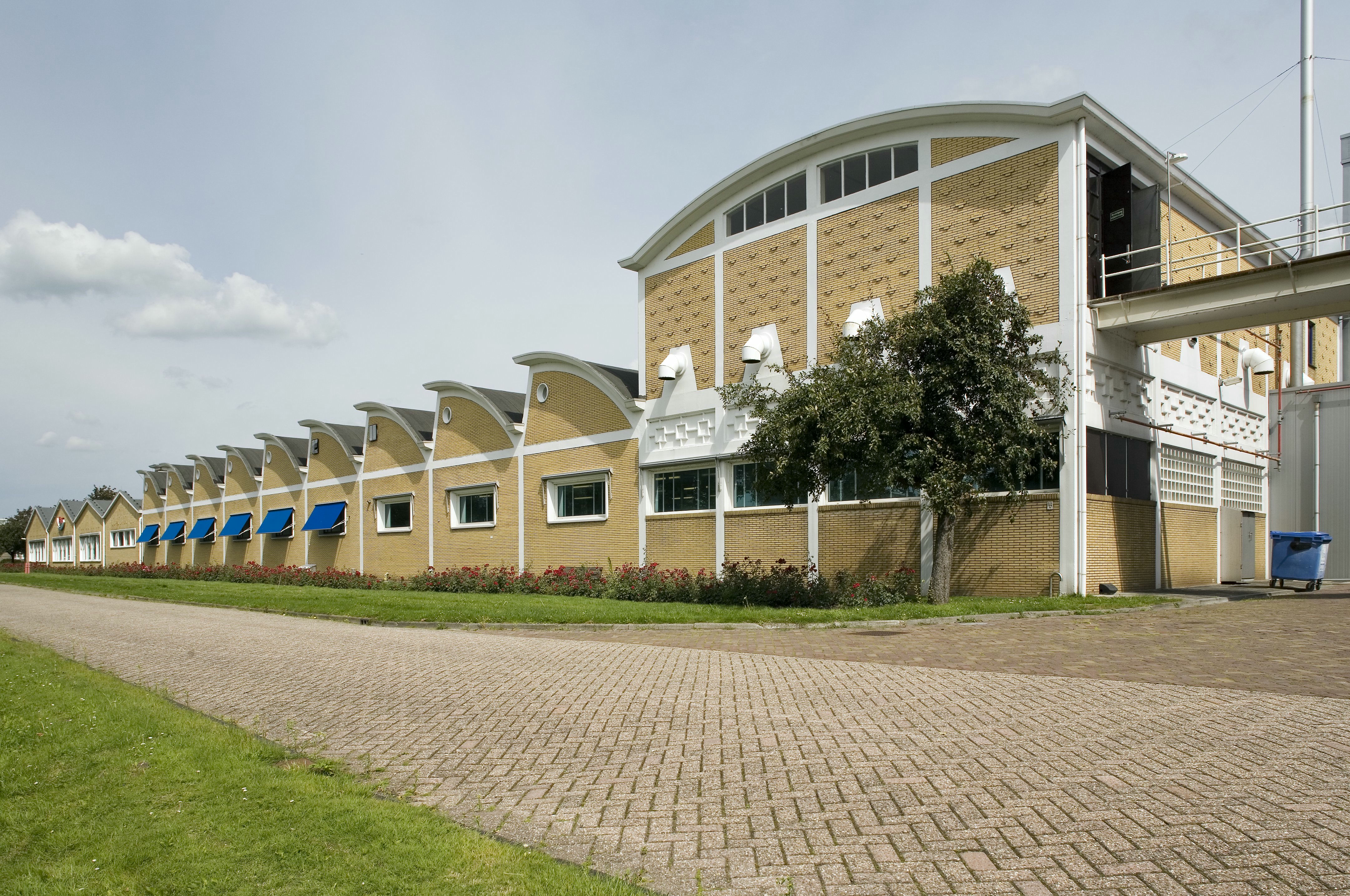 Fabriek van pepermunt en suikerwaren Tonnema: Overzicht van de gevel met sheddaken (opmerking: Gefotografeerd voor Monumenten van Herrezen Nederland, bladzijde 60)